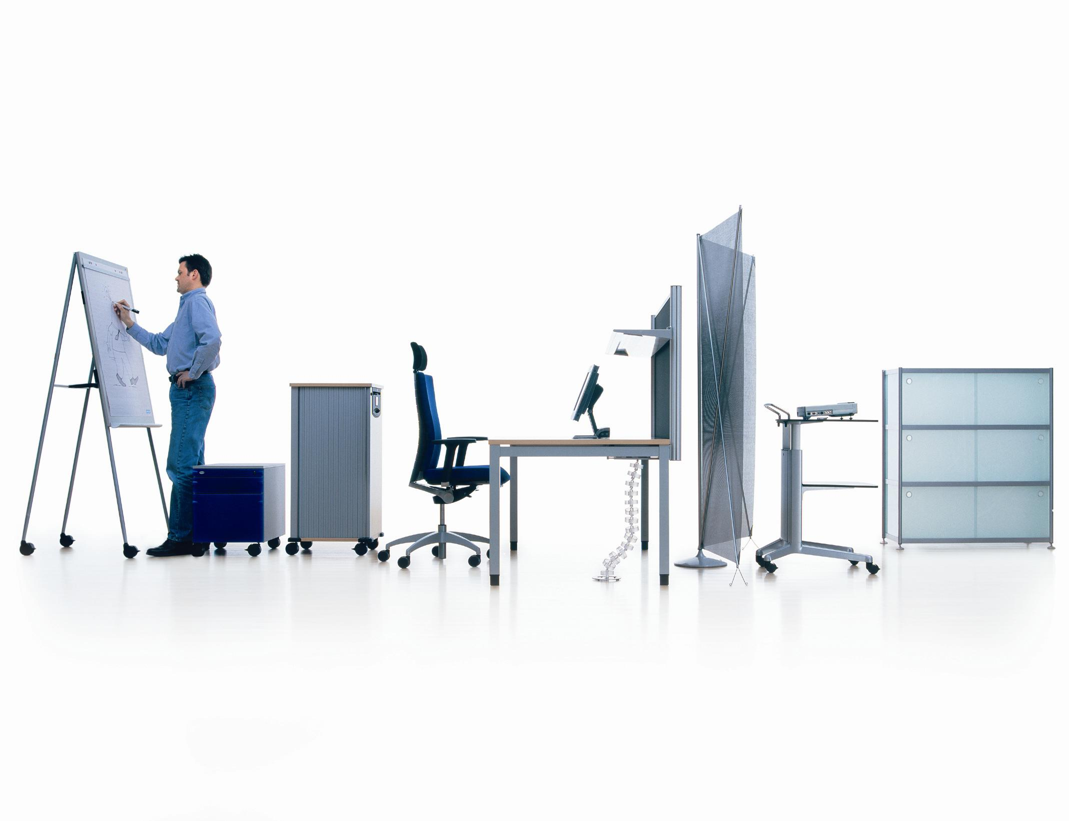 Muebles de oficina